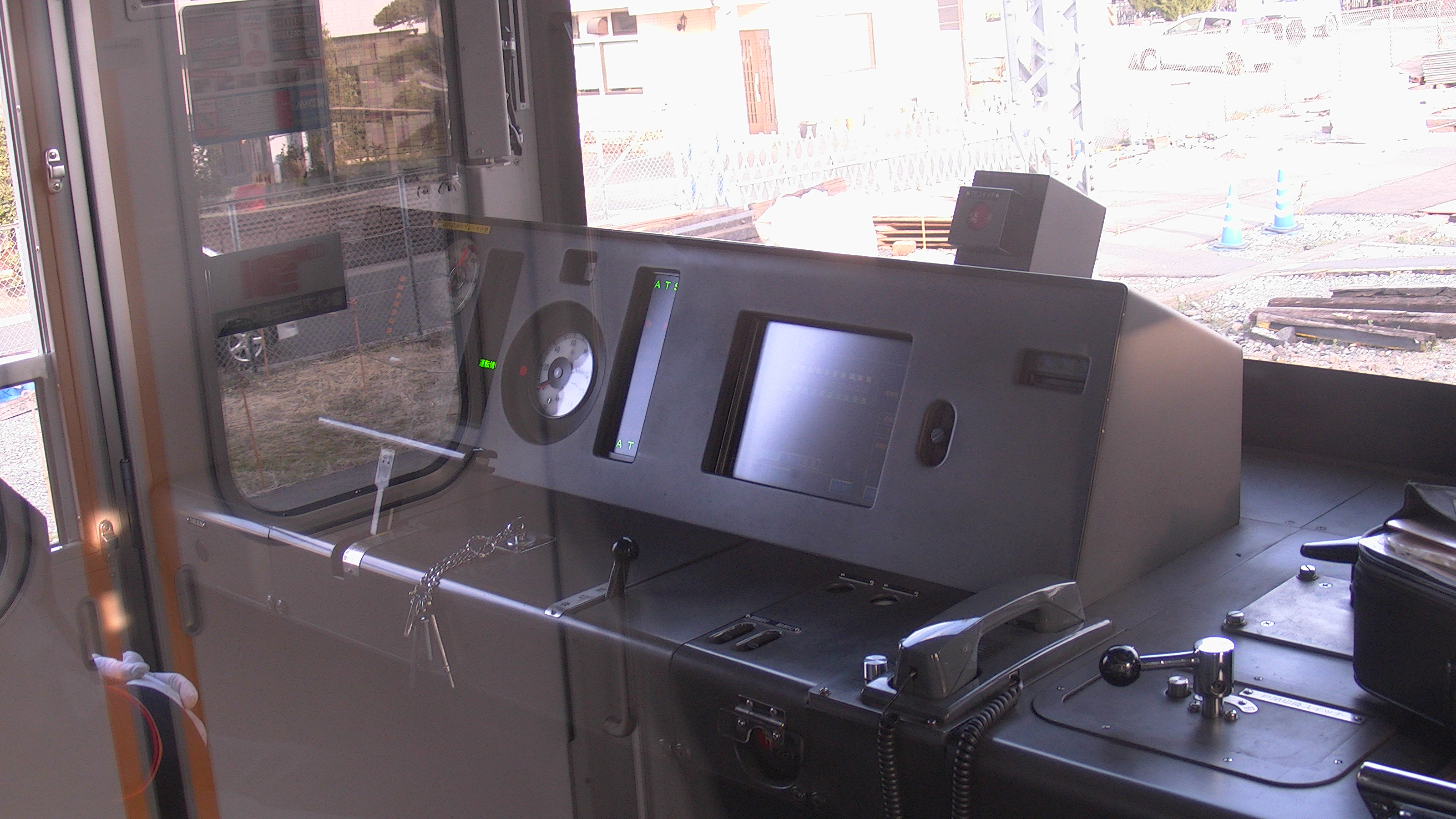 50050系の運転台